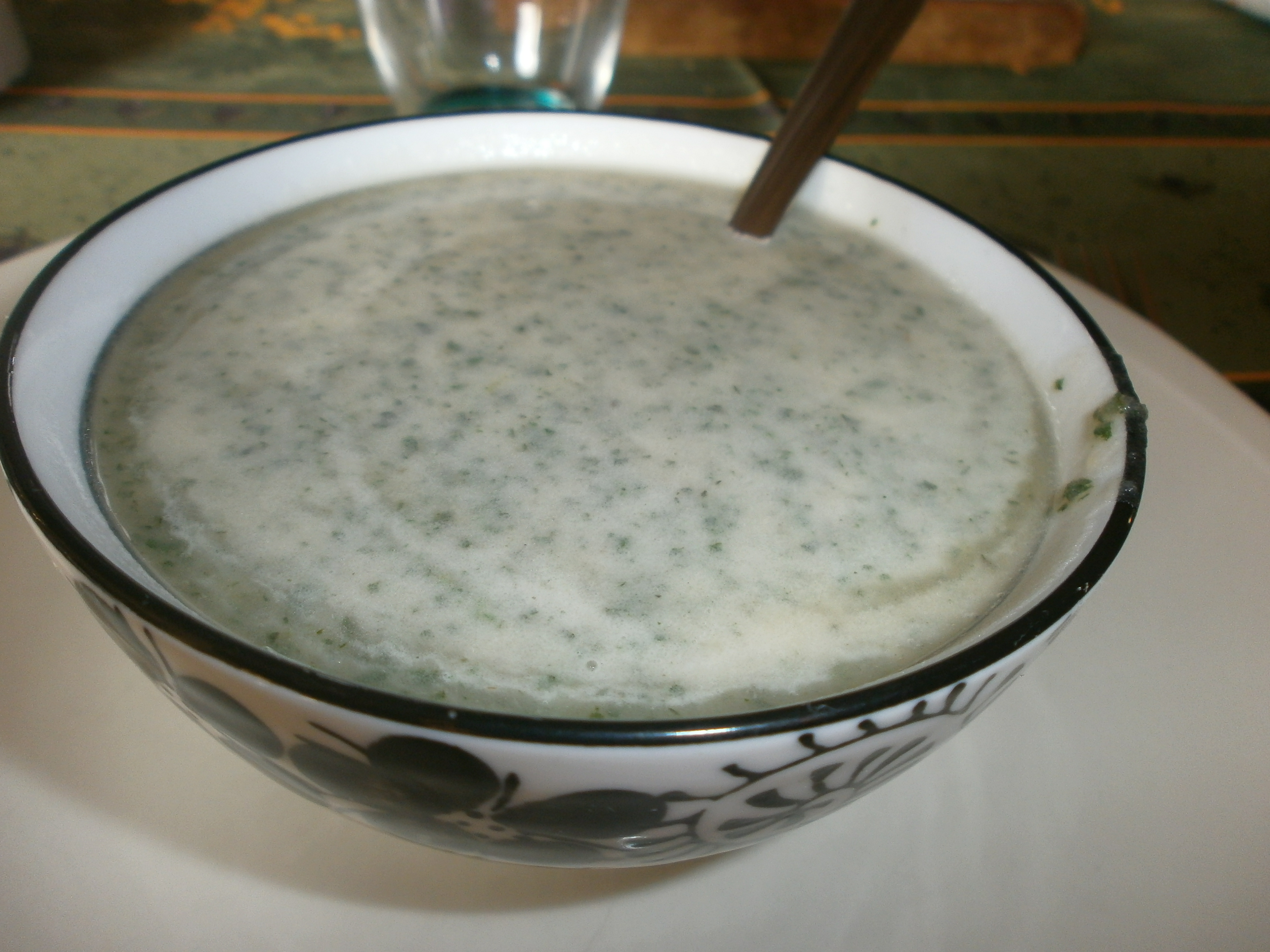 Soupe à l'ortie cuisinée à partir de feuilles d'orties cueillies à la fraîche dans mon jardin. Ingrédients : pommes de terre, oignons frits, orties, sel, poivre, et crème fraîche à la fin.